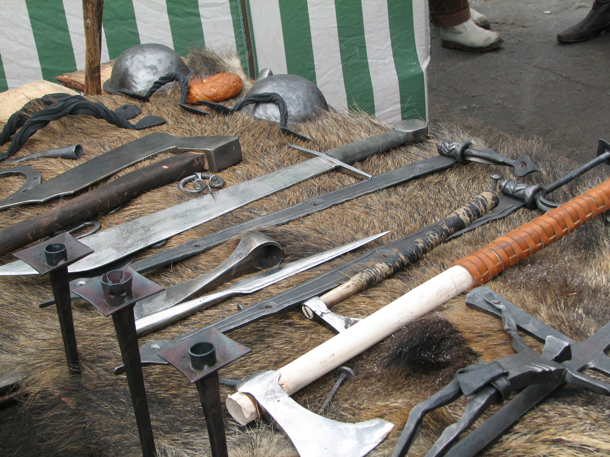 Kaziuko mugė dirbiniai iš geležies